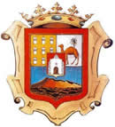 Escudo del municipio de Tinajo en Lanzarote